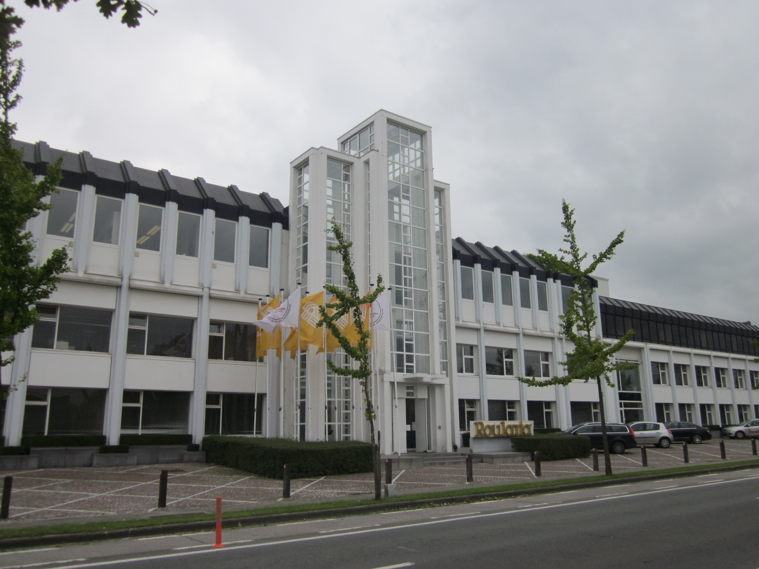 Roularta Media Group, Roeselare